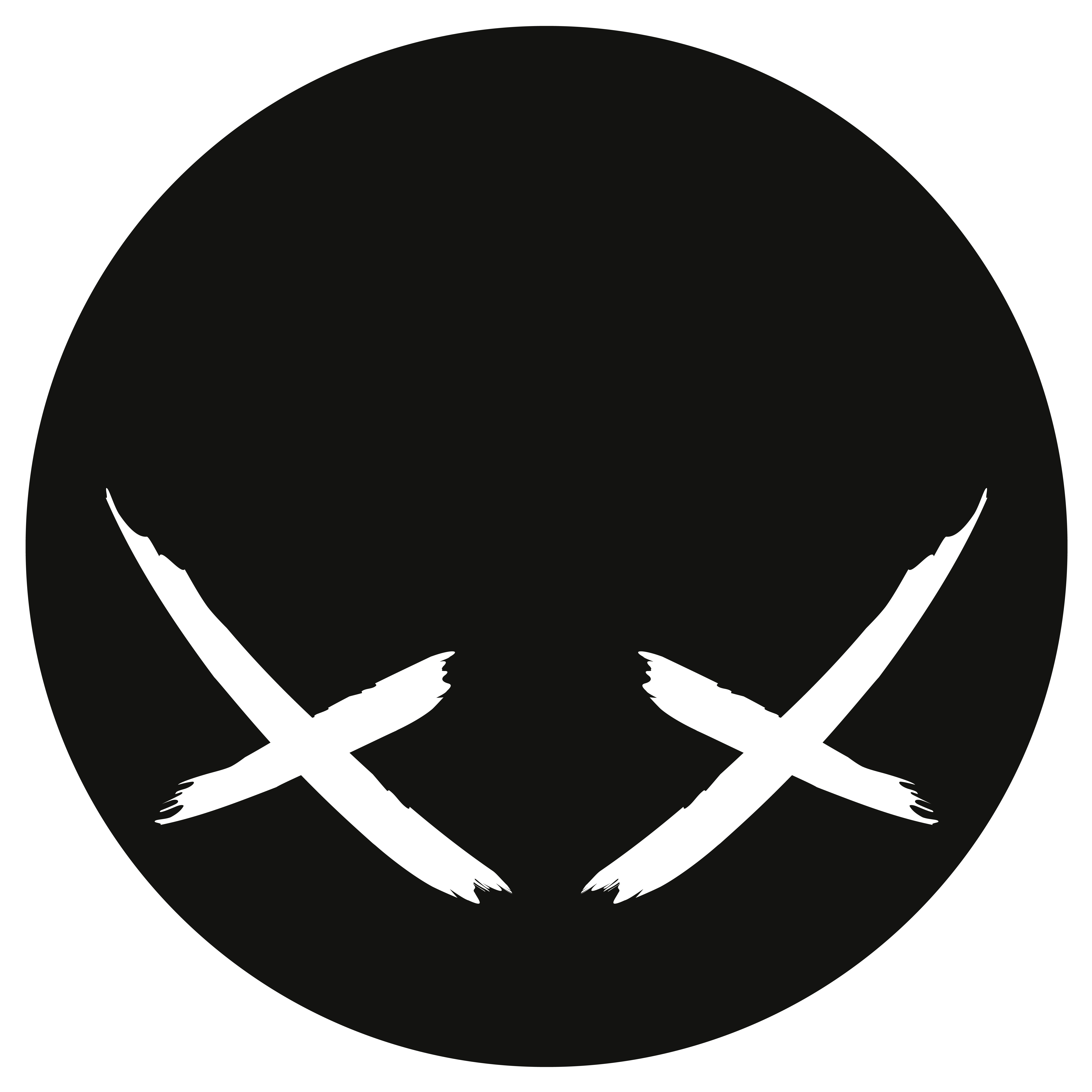 Logo del grupo musical Modestep